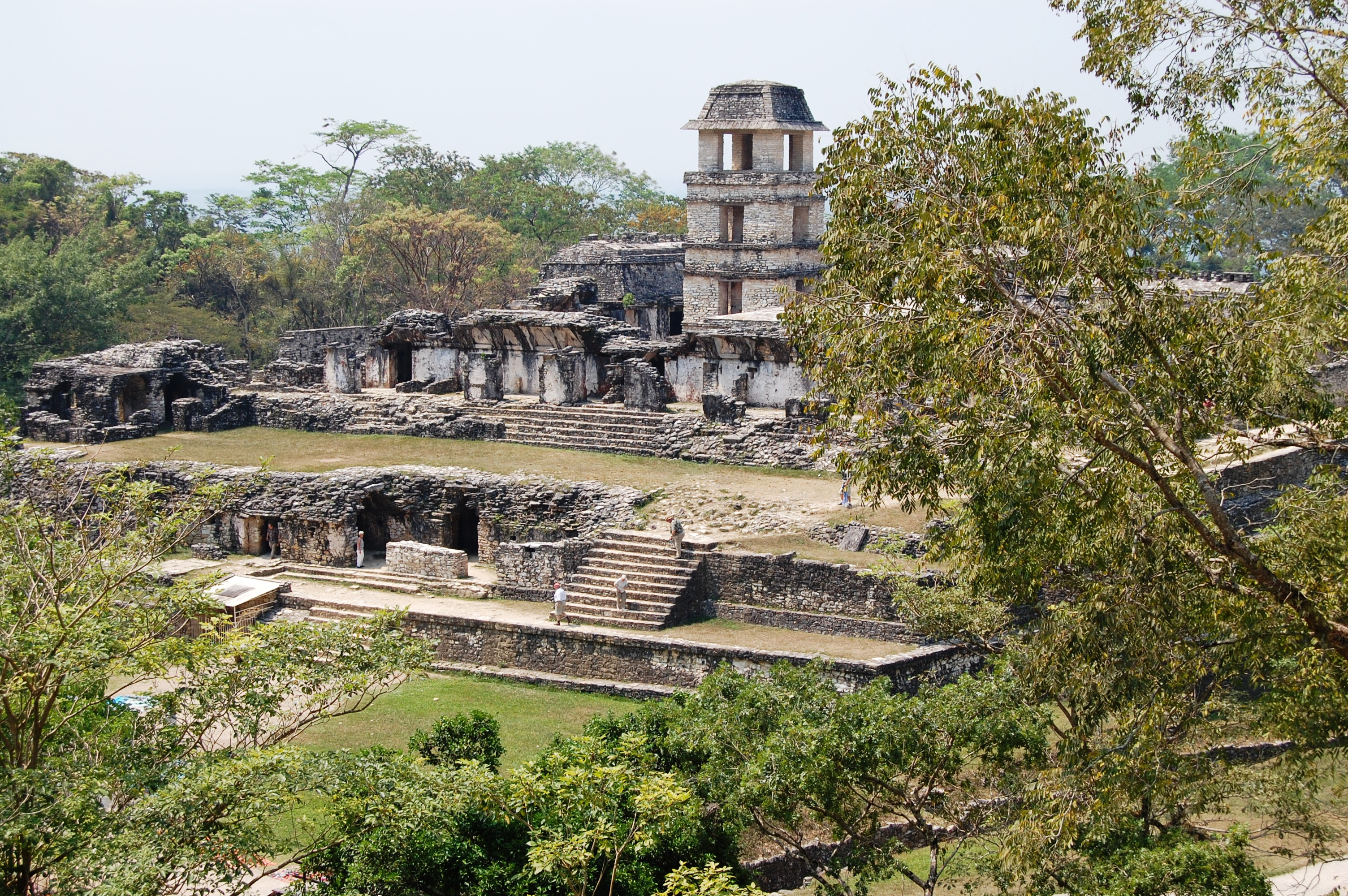 Palenque, Mexico